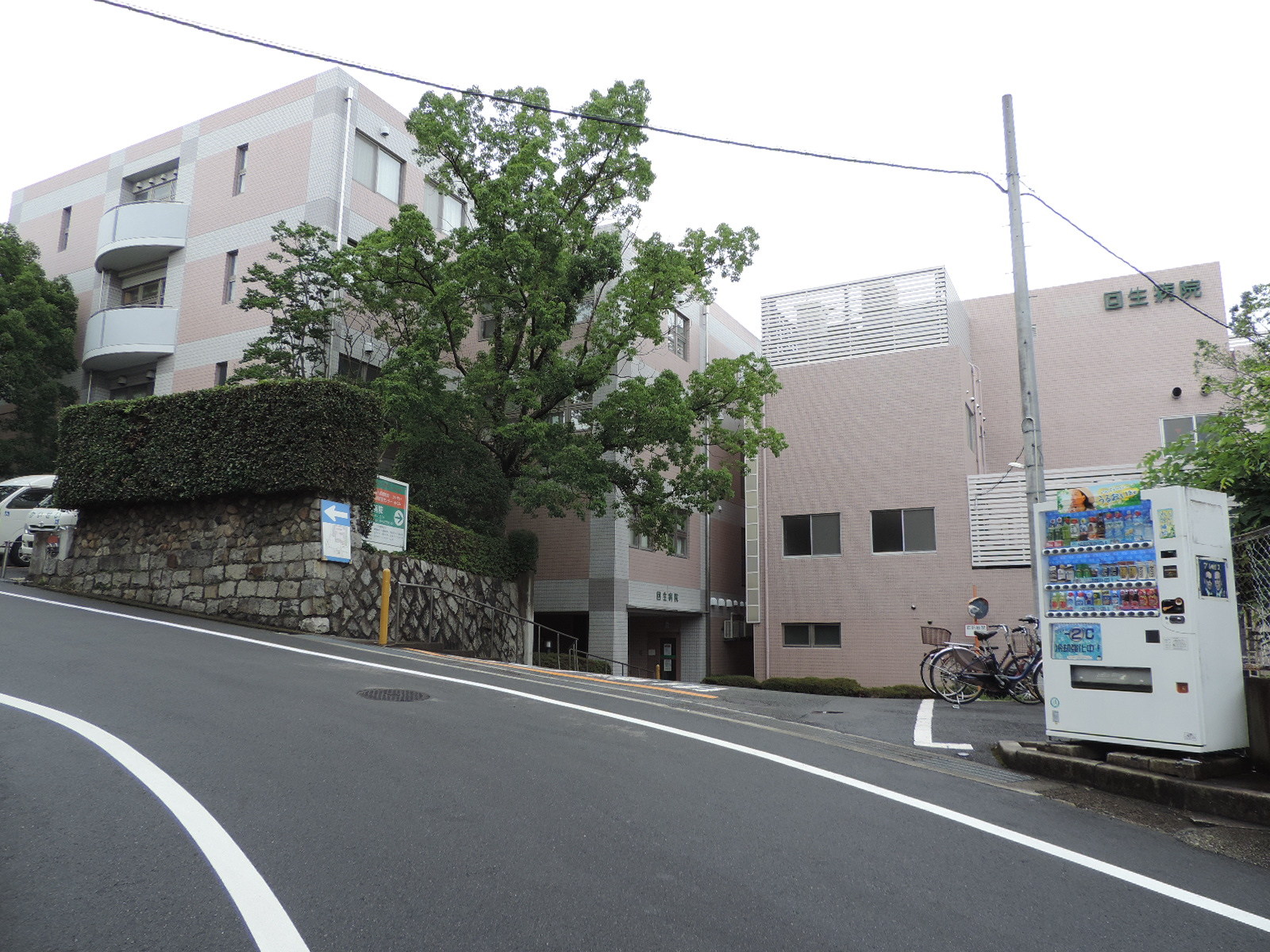 池田回生病院（大阪府池田市）。2020年7月撮影。